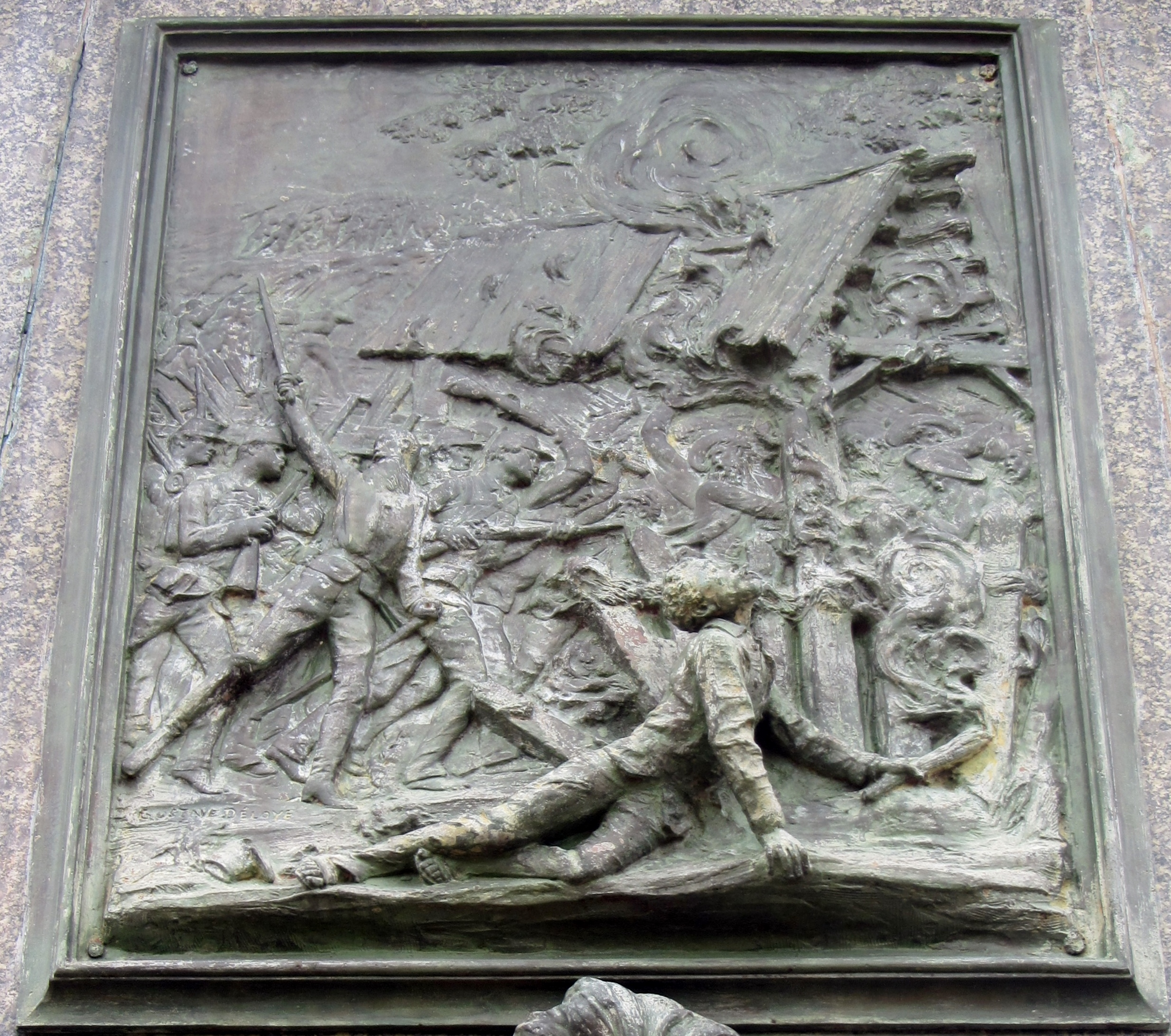 Bajorrelieve en estatua de Juan Santamaía, Alajuela, Costa Rica